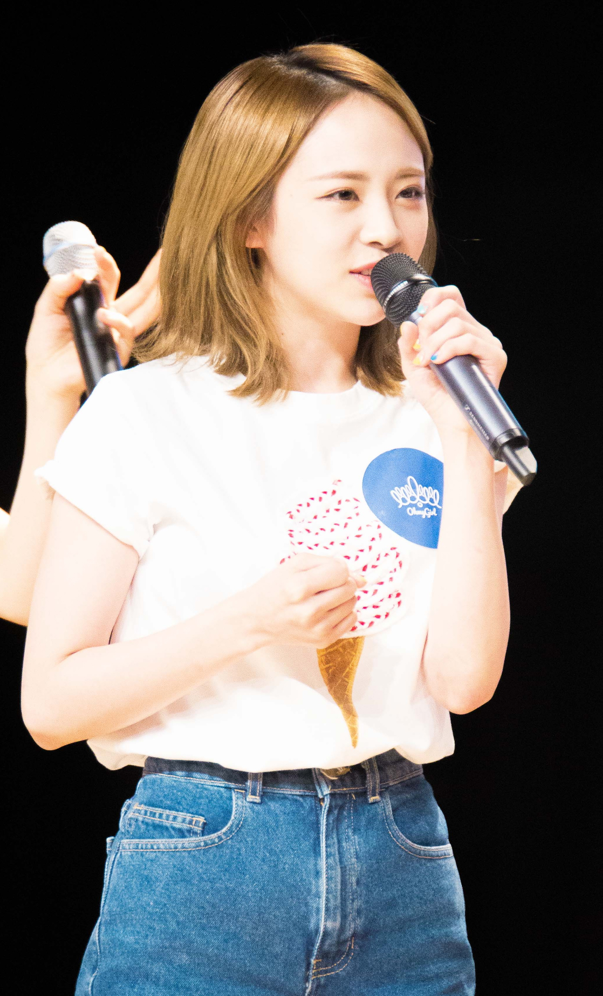 20160702 오마이걸 미라클 데이 진이